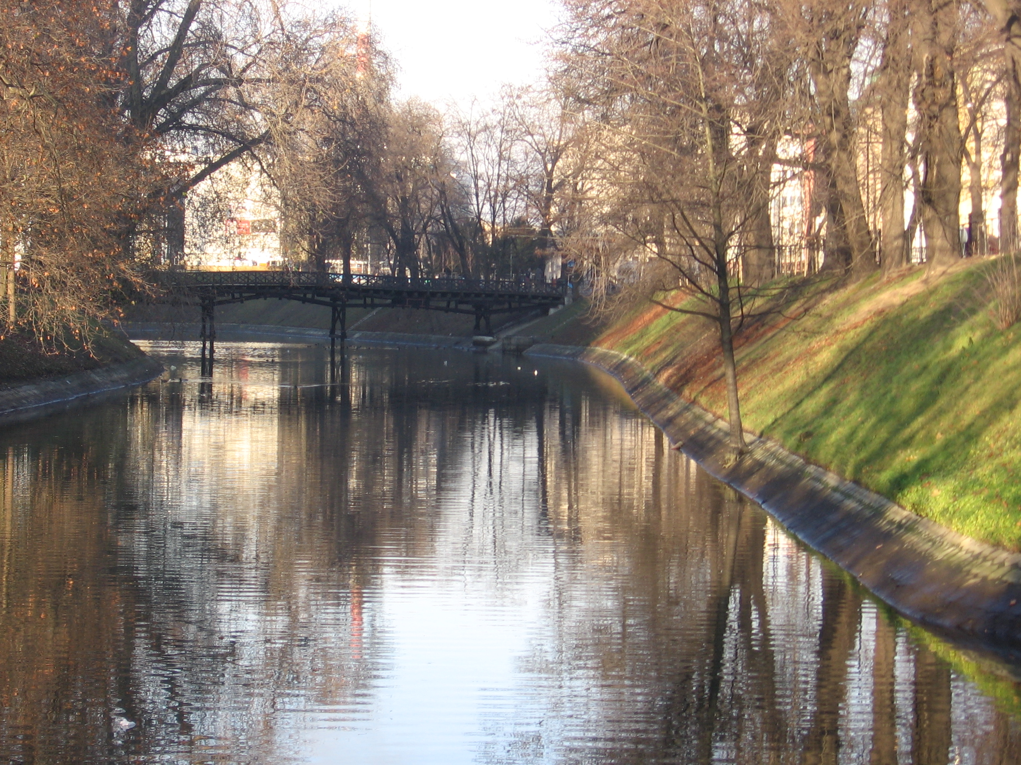 Fosa Miejska we Wrocławiu: mostek św. Antoniego